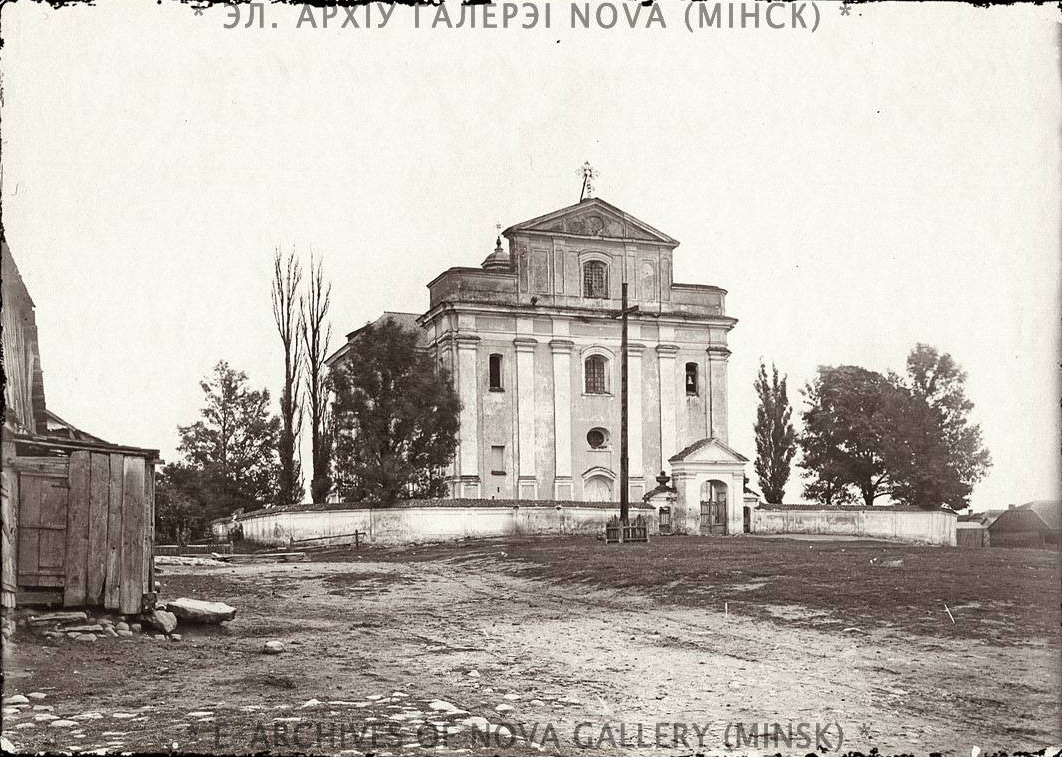 Беларуская (тарашкевіца): Бераставіца Вялікая (Bierastavica Vialikaja), рог пляцу Рынку (plac Rynak) і вуліцы Хадкевічаўскай (vulica Chadkievičaŭskaja). Касьцёл Візытацыі Найсьвяцейшай Панны Марыі